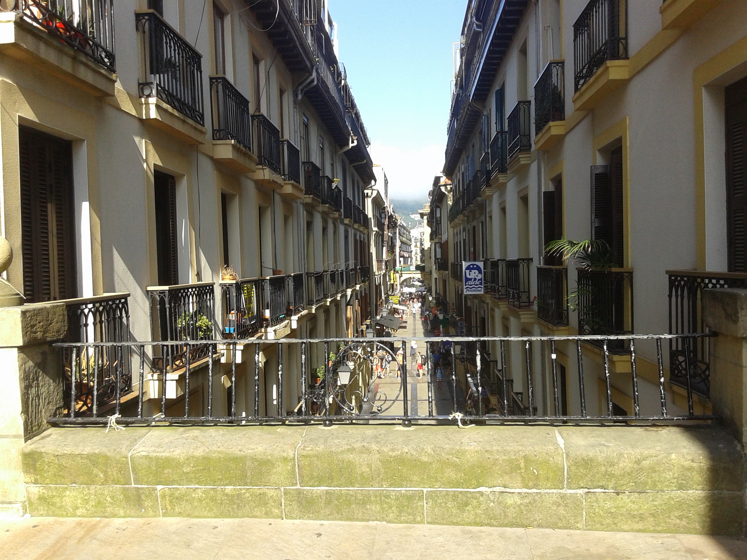 Kanpandegi kaleko zubitik Portu kalearen ikuspegia.